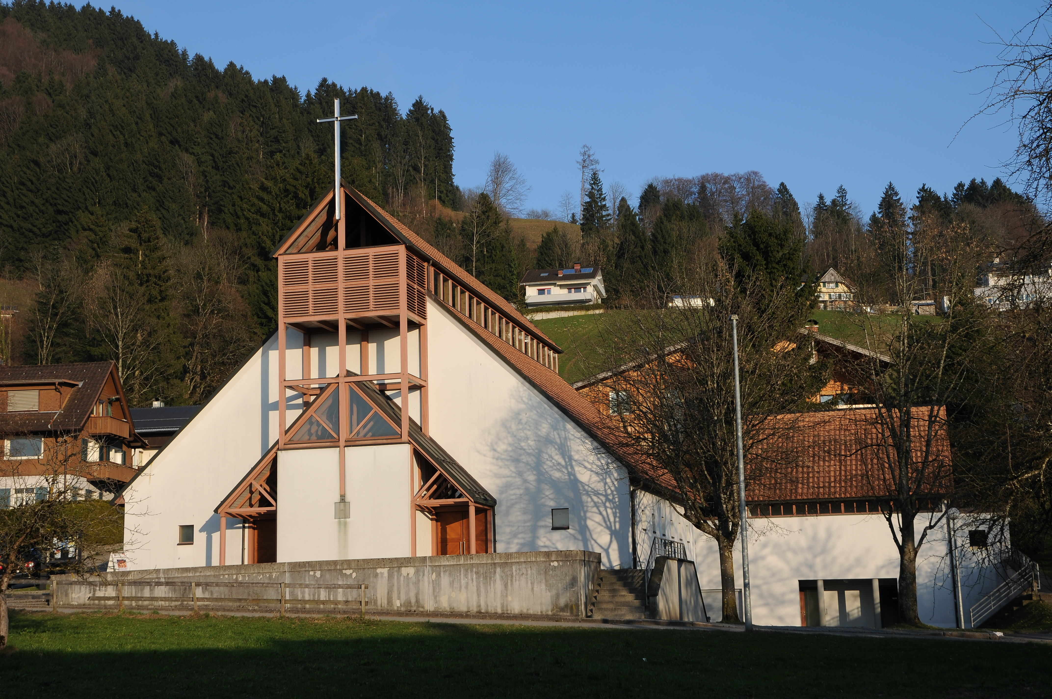 Kirche Maria Königin des Friedens in Watzenegg. Alte Kapelle von 1780 abgetragen. Neubau der Kirche 1983/84 nach Plänen von Wolfgang Ritsch und den Brüdern Wäger.